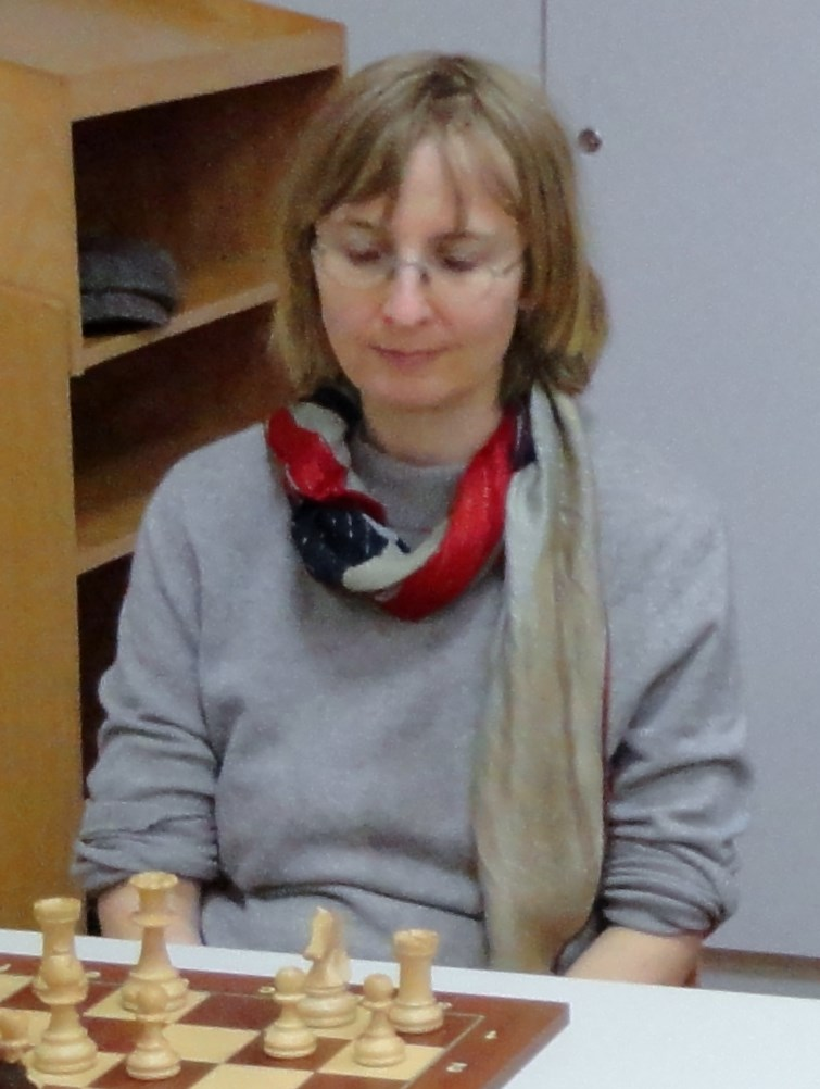 Bettina Trabert, Mannschaftskampf SK Freiburg-Zähringen 1887 - SGEM Rochade Kuppenheim, November 2013 in Freiburg.